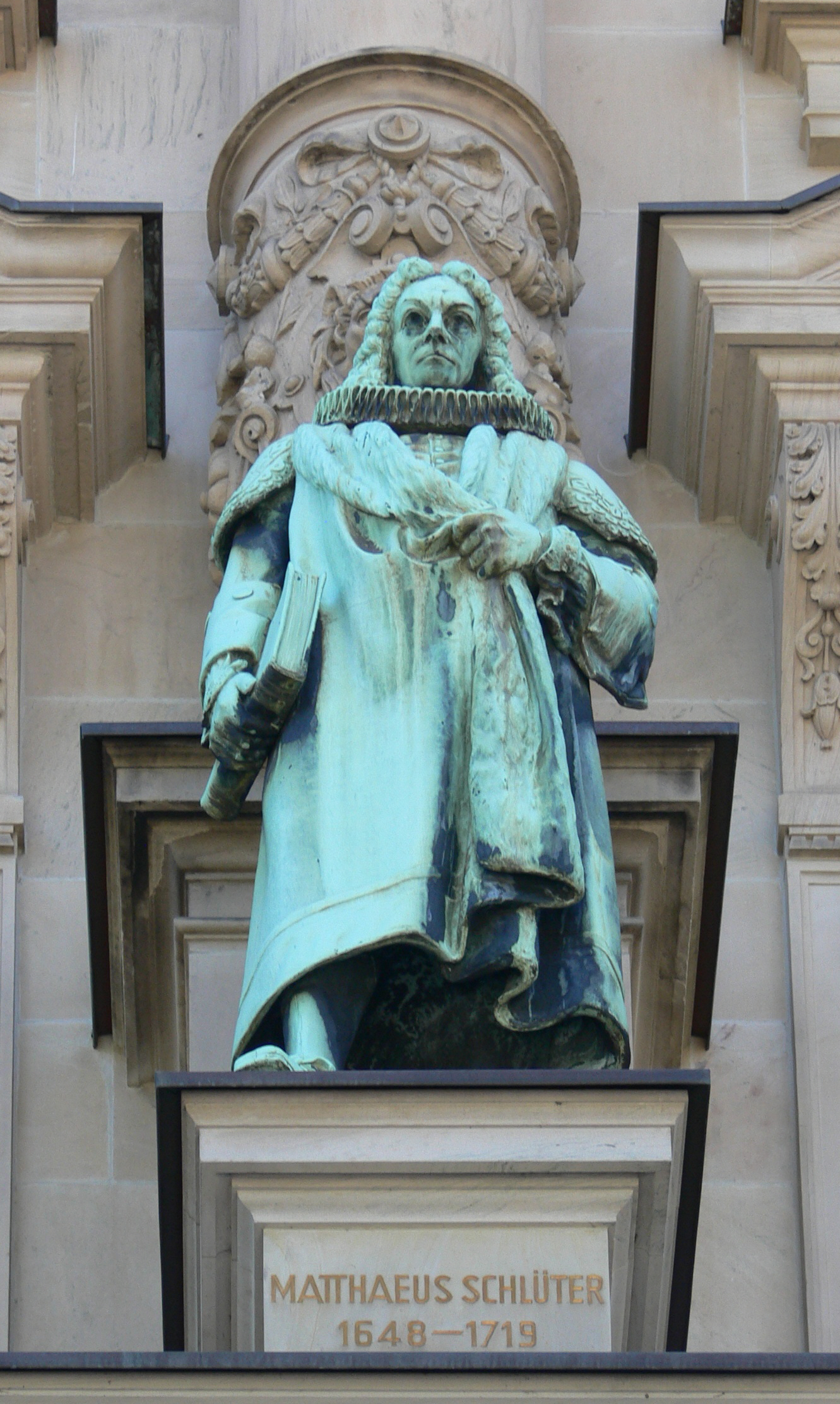 Hamburg, Ziviljustizgebäude, Statue Matthäus Schlüter von Eduard Albrecht